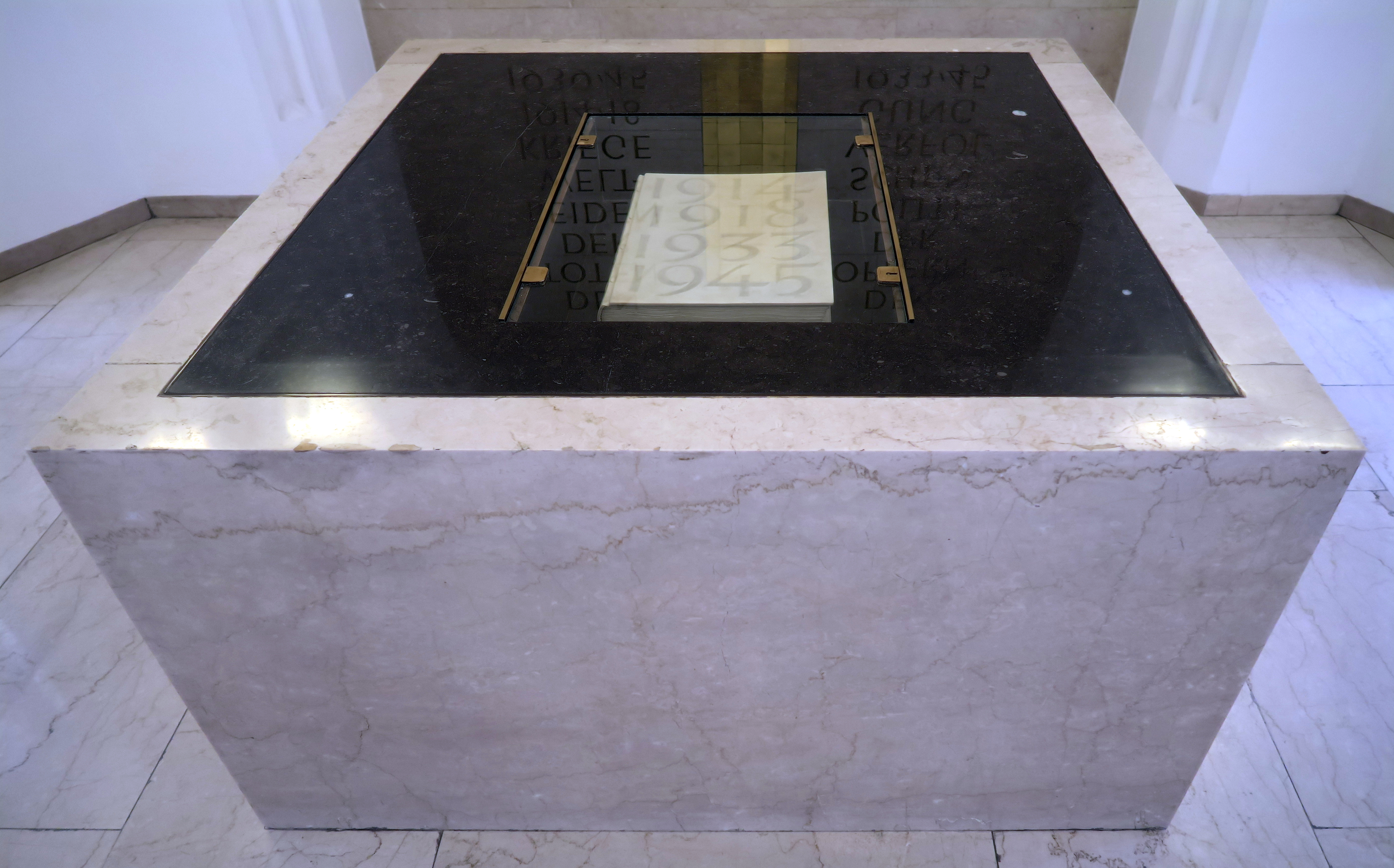 Deutschland, Bayern, München, Gedenkraum im Neuen Rathaus, Kubus mit Folianten, der die Namen der Toten beider Weltkriege enthält